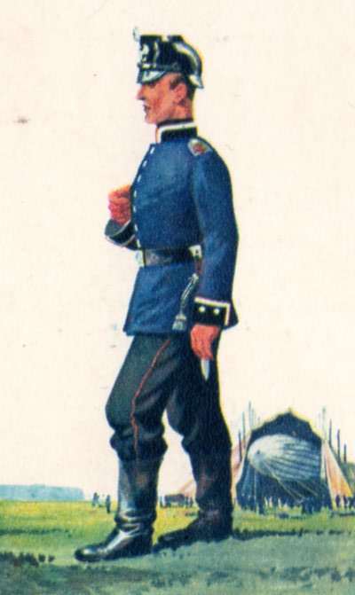 Unteroffizier des Luftschiffer-Bataillons Nr. 4 in Mannheim im Ordonnanzanzug um 1910. Das Bataillon gehörte dem XIV. Armeekorps (Baden) an.